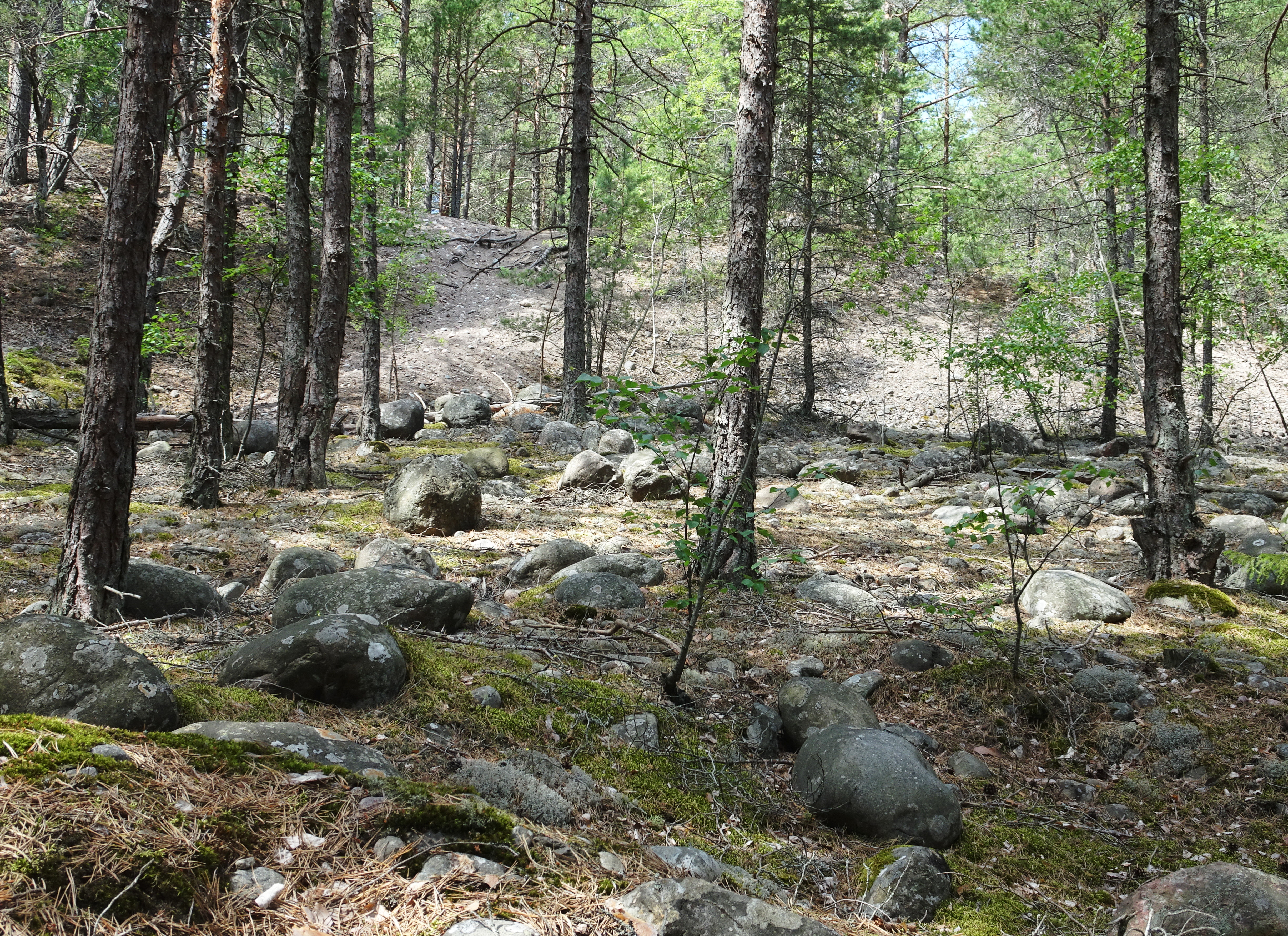 Flottsbronäsets rullstensåsar